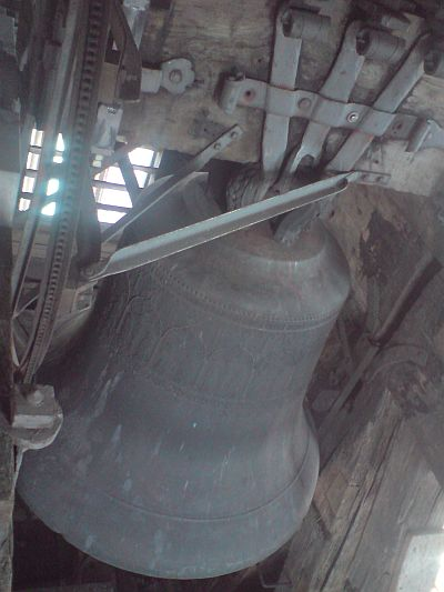 Laurentia (e') der St. Lorenzkirche, Nürnberg